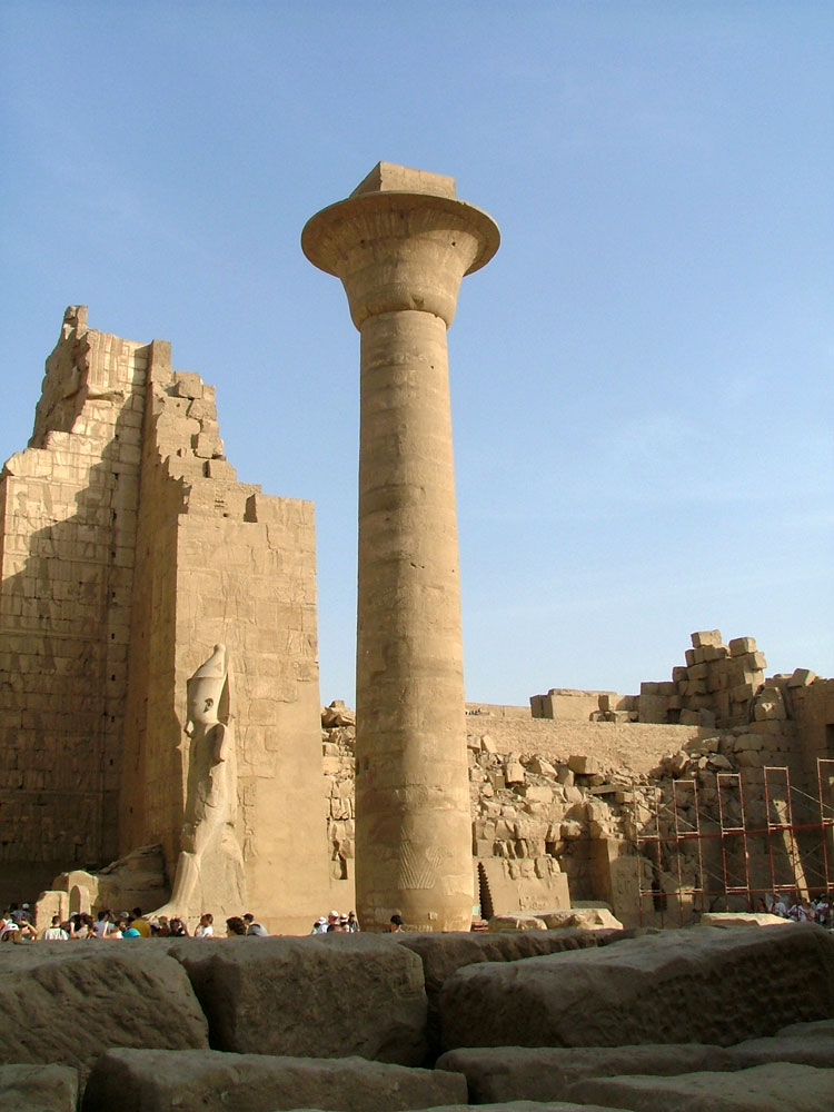 Karnak. Colonne de Taharqa (21 m de haut)